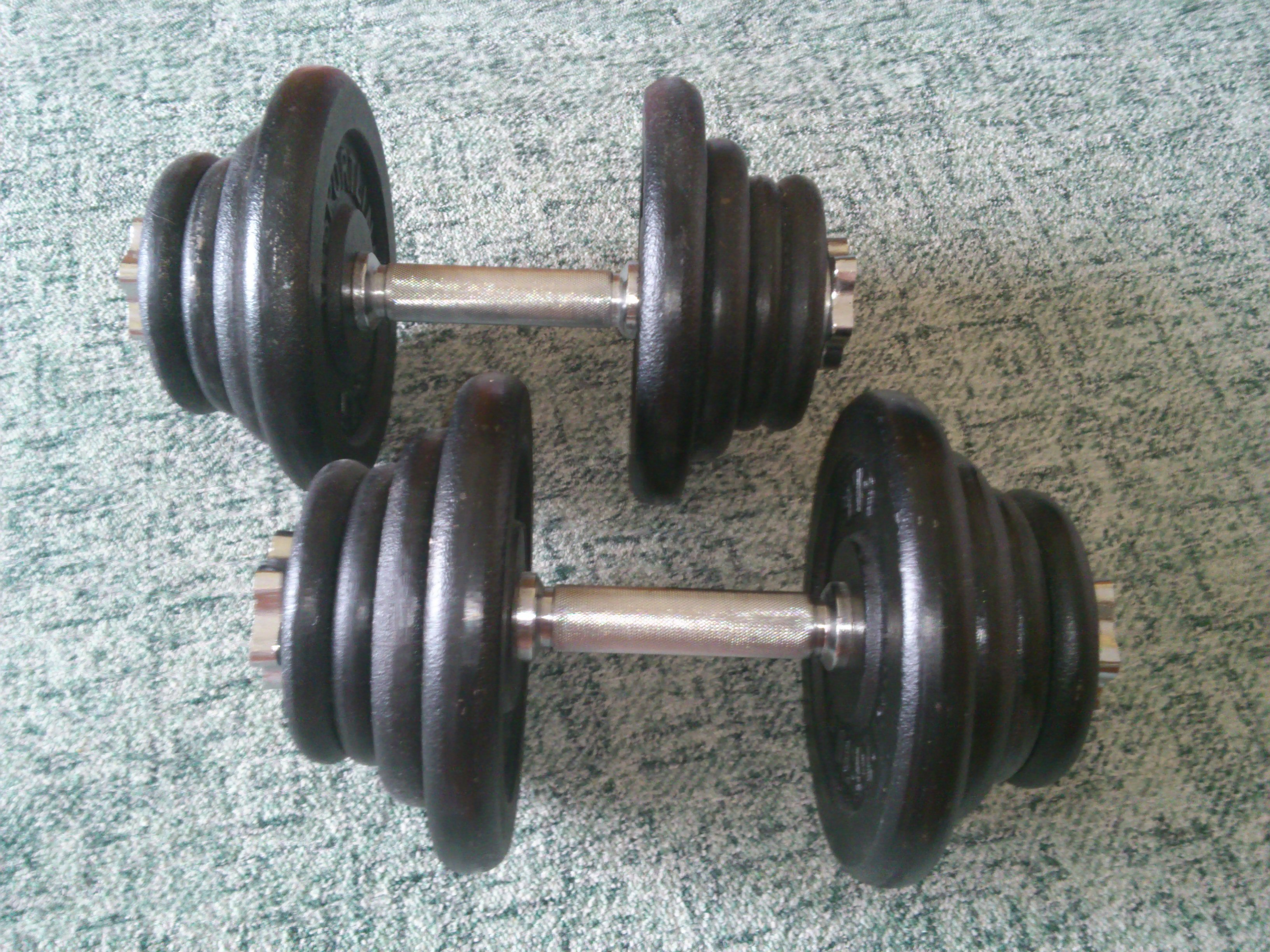 Jeden pár železných jednoručních činek. Váha: 2 x 21,5 kg